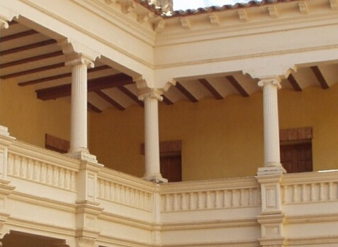 Detalle interior del castillo de Monteagudo de las Vicarias (Soria)